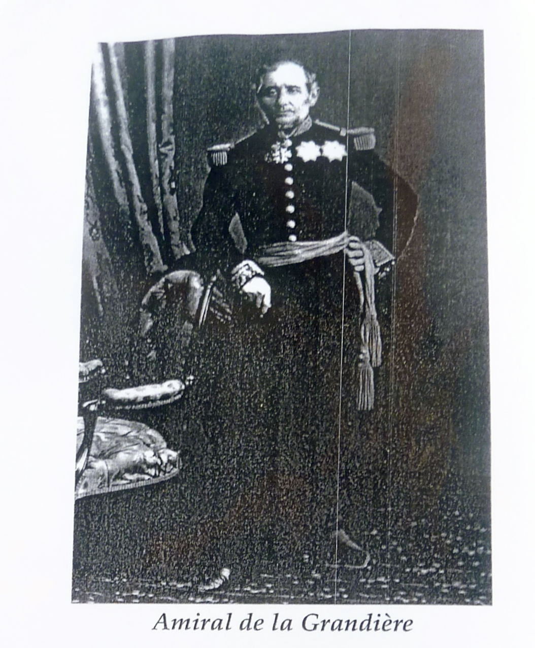 L'amiral de La Grandière (notice du château de Trohanet)